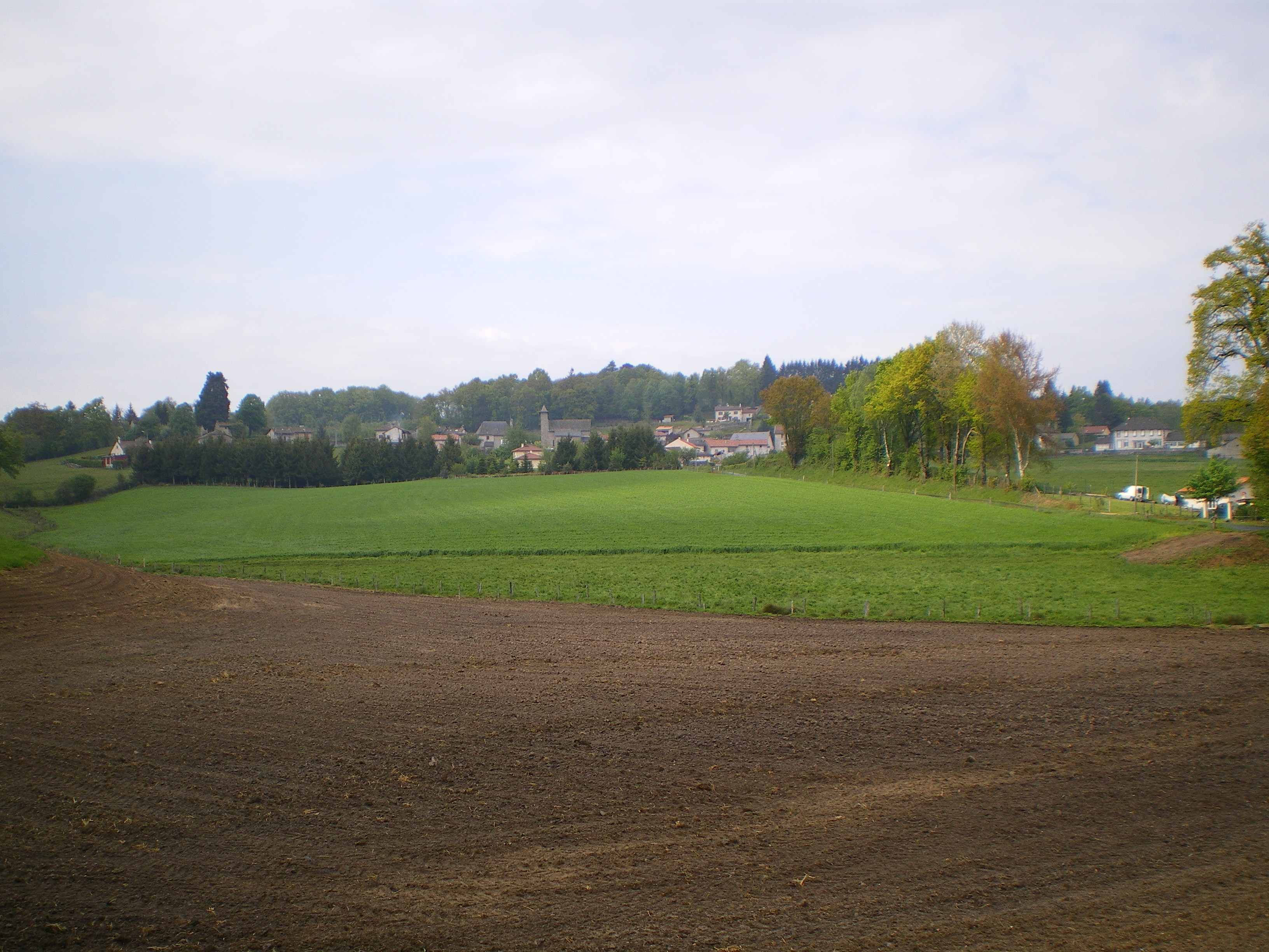 Roumégoux, Cantal, France